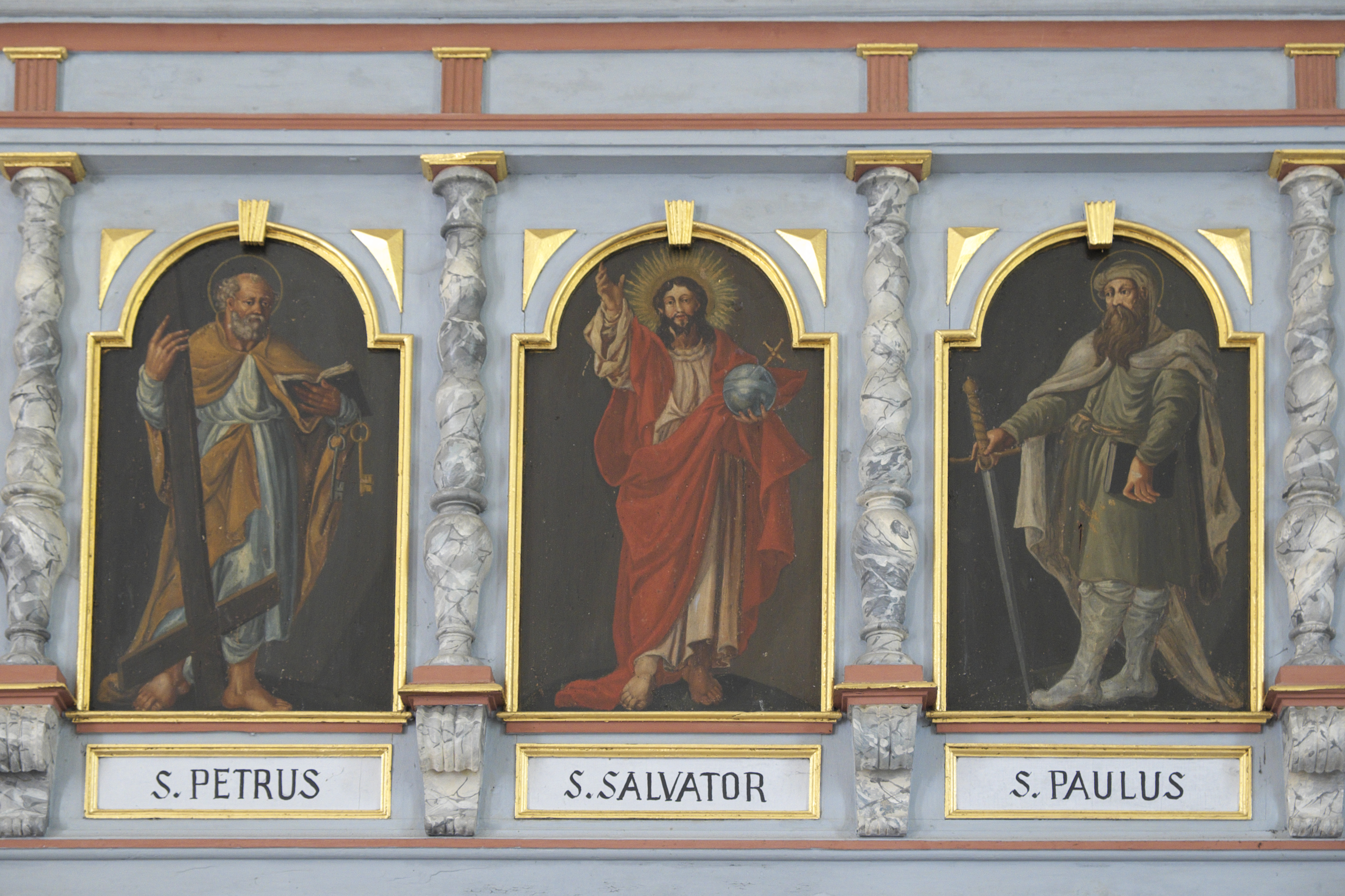 Katholische Filialkirche St. Peter und Paul in Holzkirchen (Alling) im Landkreis Fürstenfeldbruck (Bayern/Deutschland), Orgelempore von 1696 mit Bildern Jesu und der zwölf Apostel